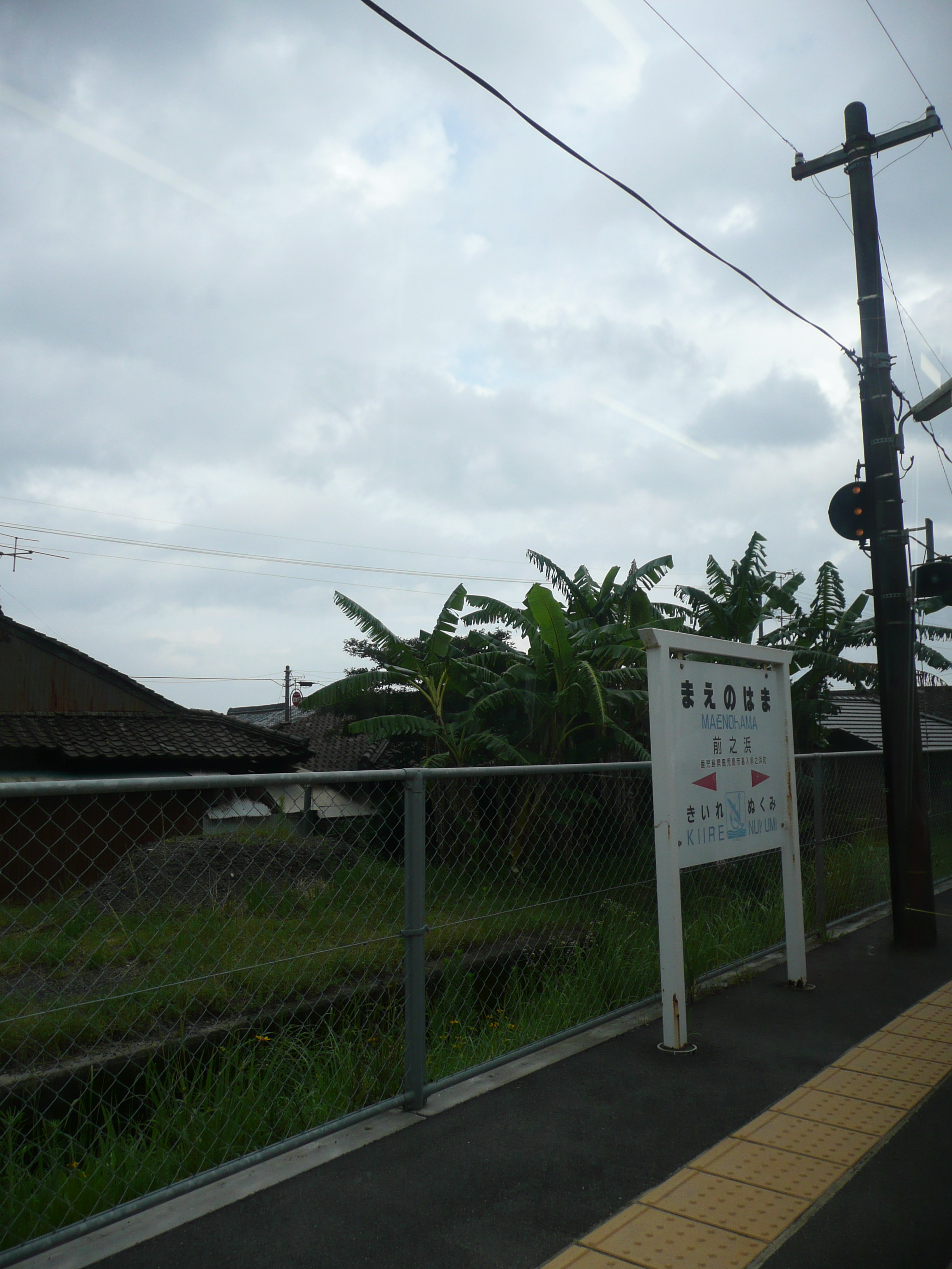 前之浜駅の看板